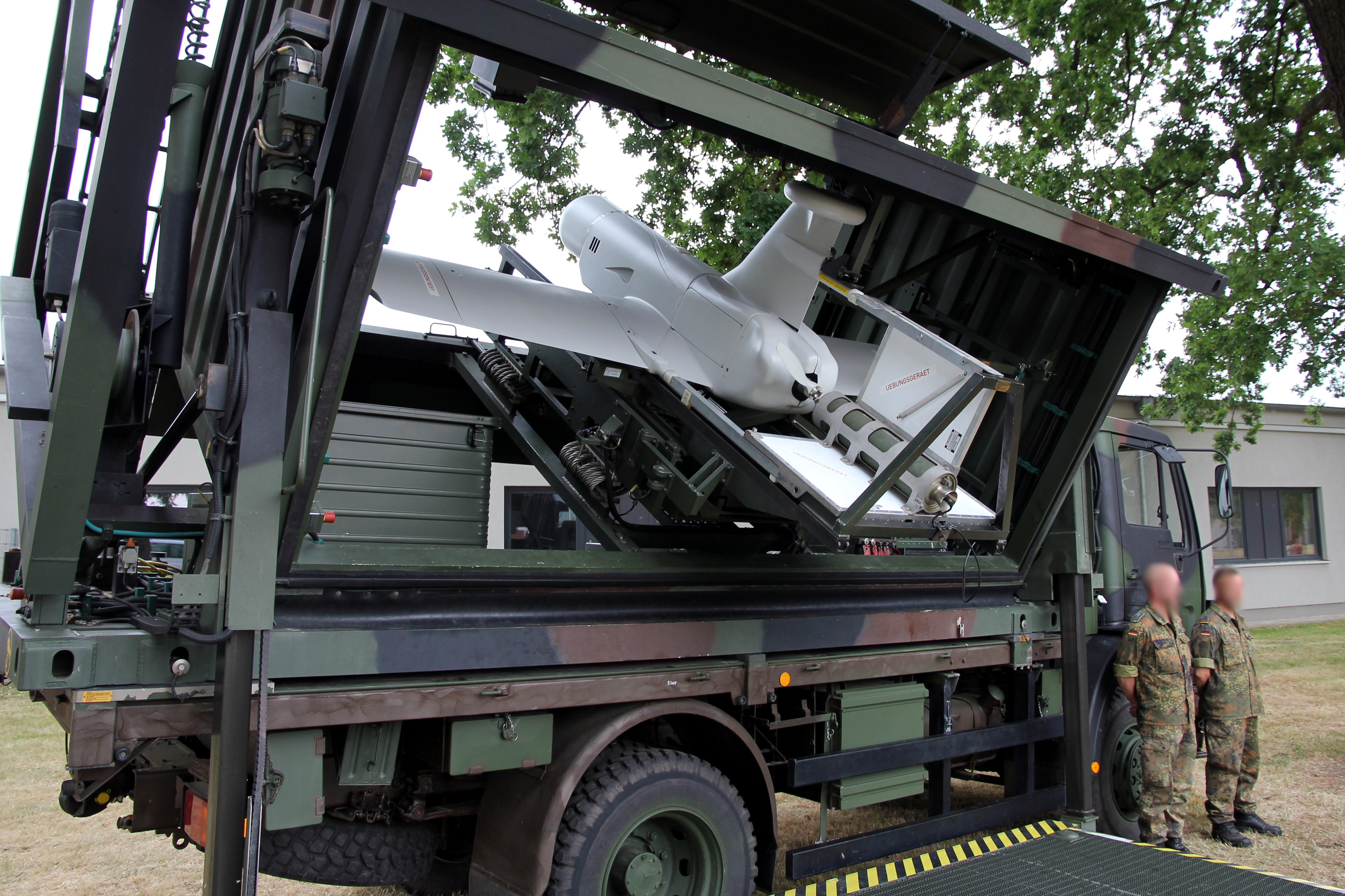 Rheinmetall KZO, eine Drohne der Bundeswehr. Das System wurde am Tag der Bundeswehr in der Emmich-Cambrai-Kaserne in Hannover vom Aufklärungslehrbataillon 3 Lüneburg ausgestellt.